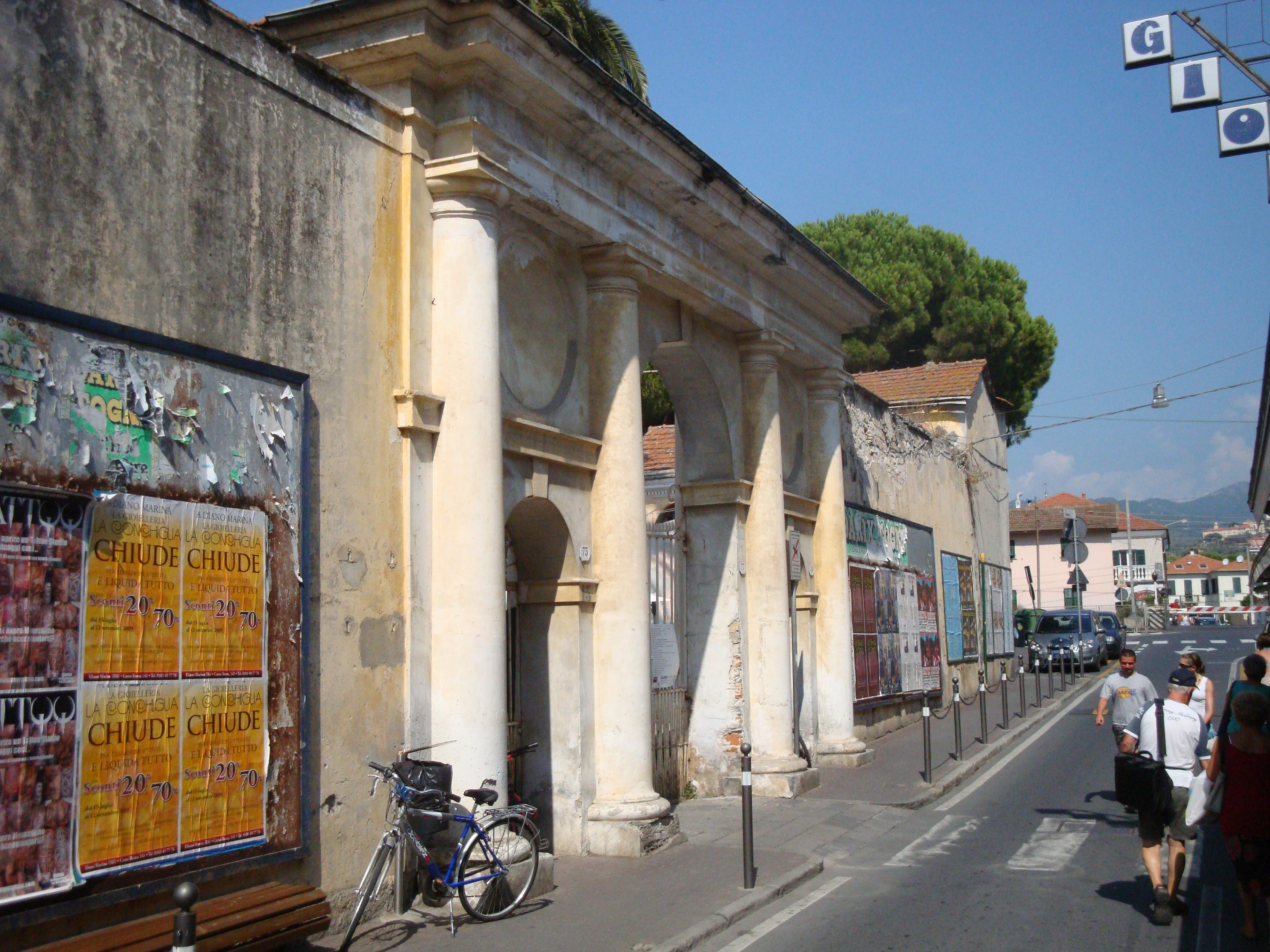 Autore: Tony Frisina - Alessandria